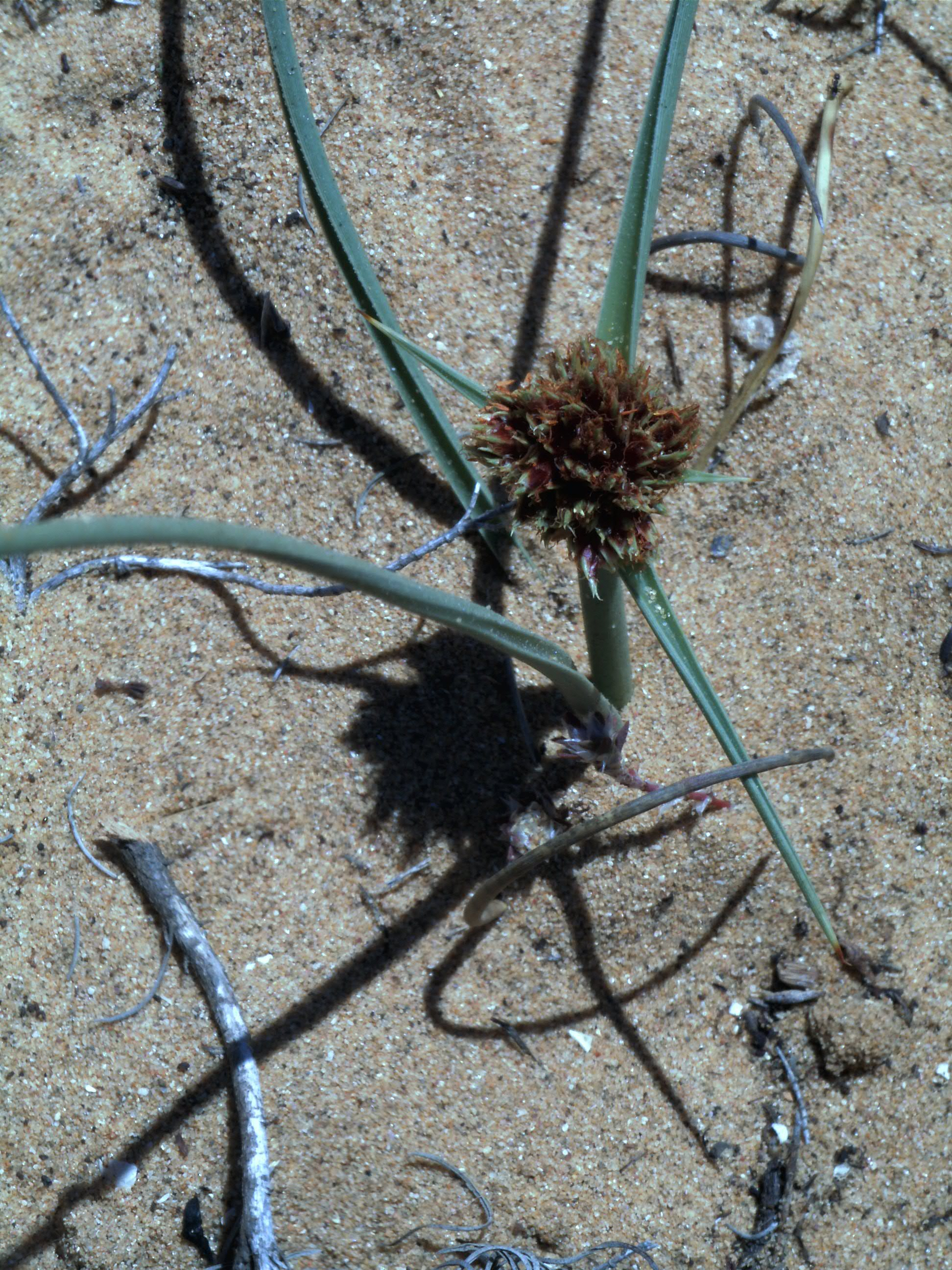 Name Cyperus capitatus Familiy Cyperaceae